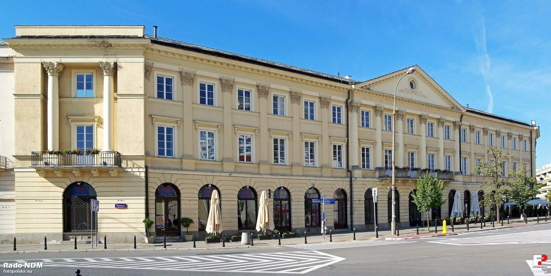 Kamienica Petiscusa widziana z ulicy Wierzbowej